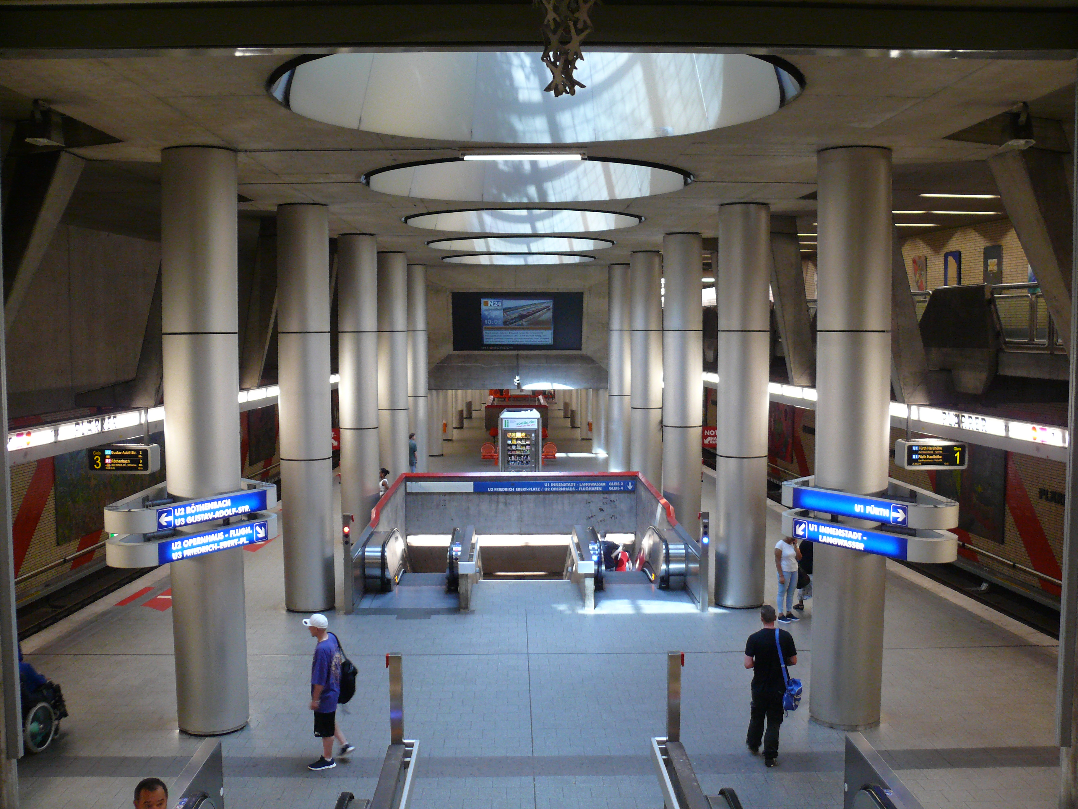 Blick vom Verteilergeschoss auf Ebene -1 auf die Bahnsteigebene -2. In der Mitte der Abgang zur Bahnsteigebene -3.